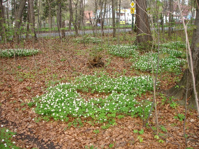 Zawilce w rezerwacie Las Chałubińskich; Zakopane